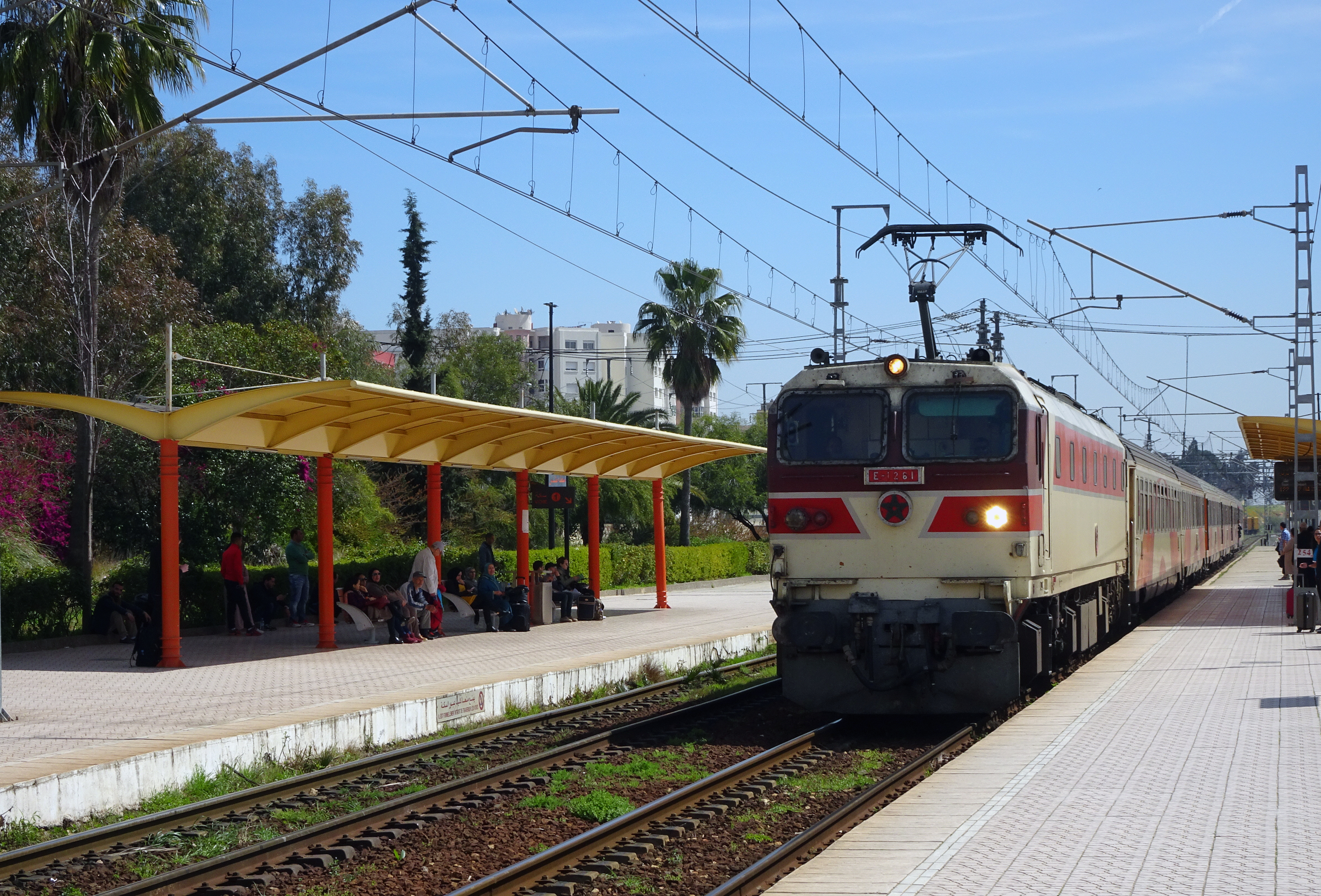 La gare ferroviaire de Meknès au Maroc